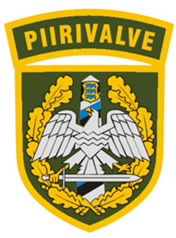 Piirivalve varrukaembleem